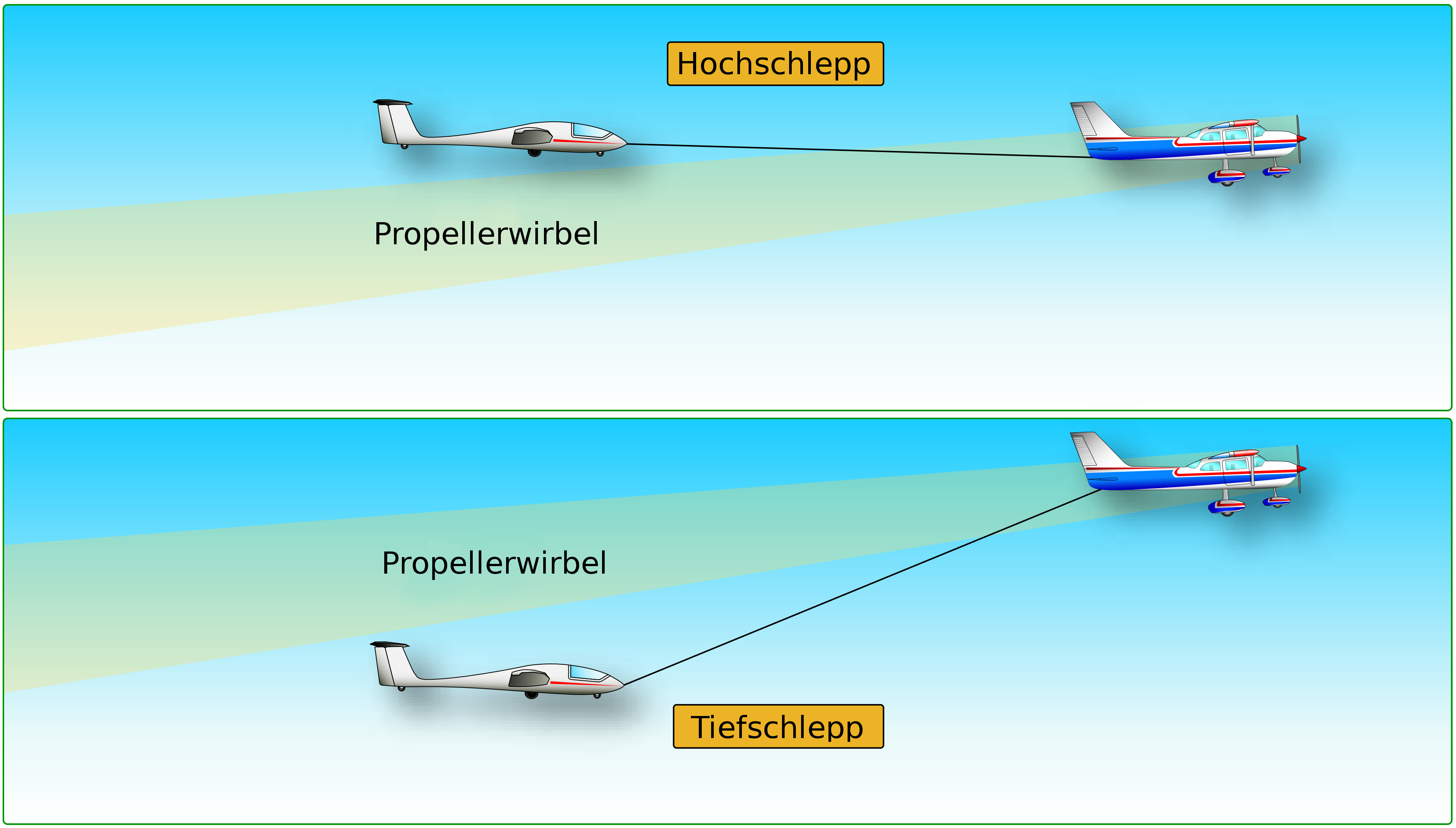 Position des Segelflugzeuges beim Flugzeugschlepp.